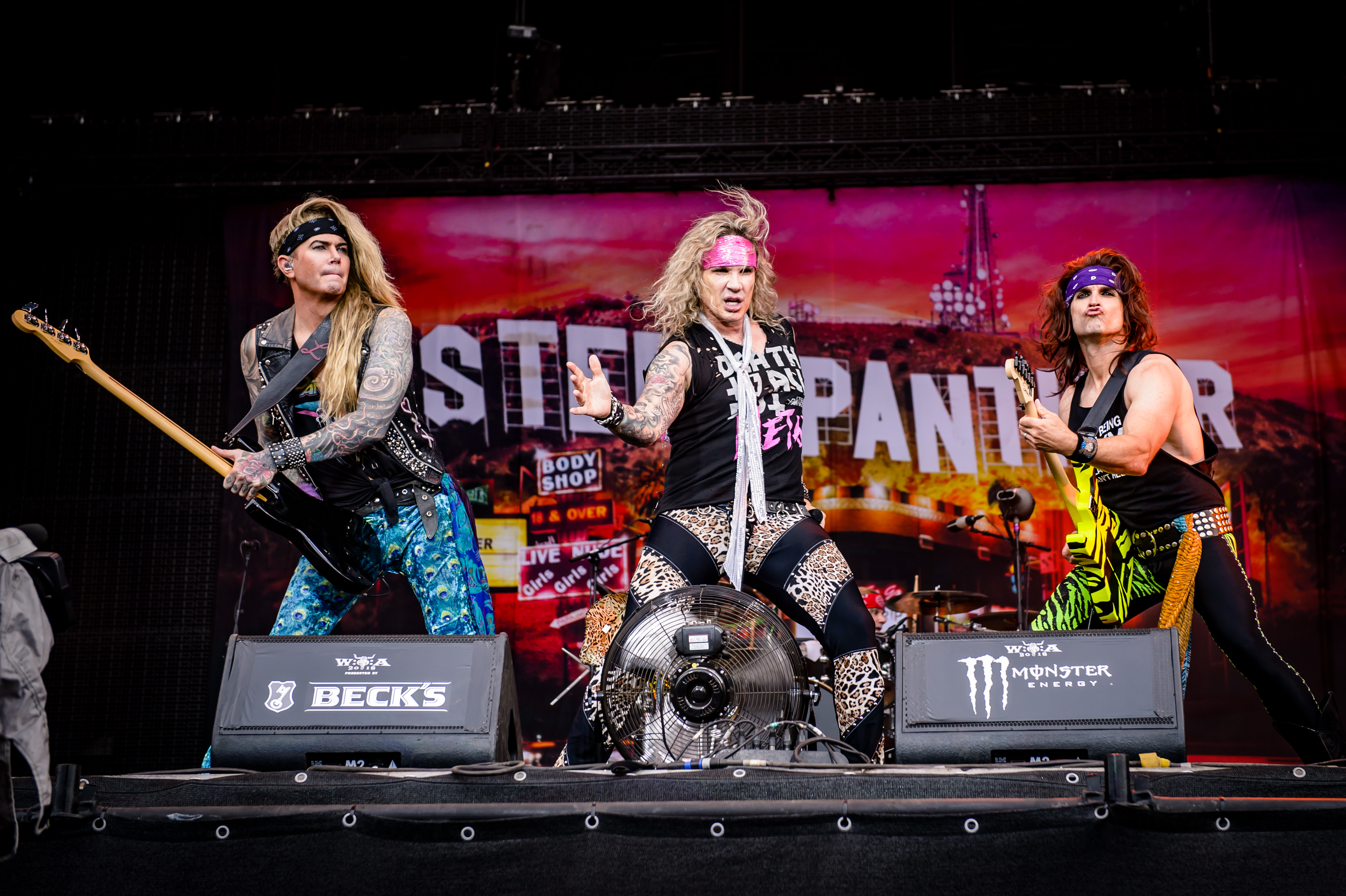 'Wacken Open Air 2018': 'Steel Panther'